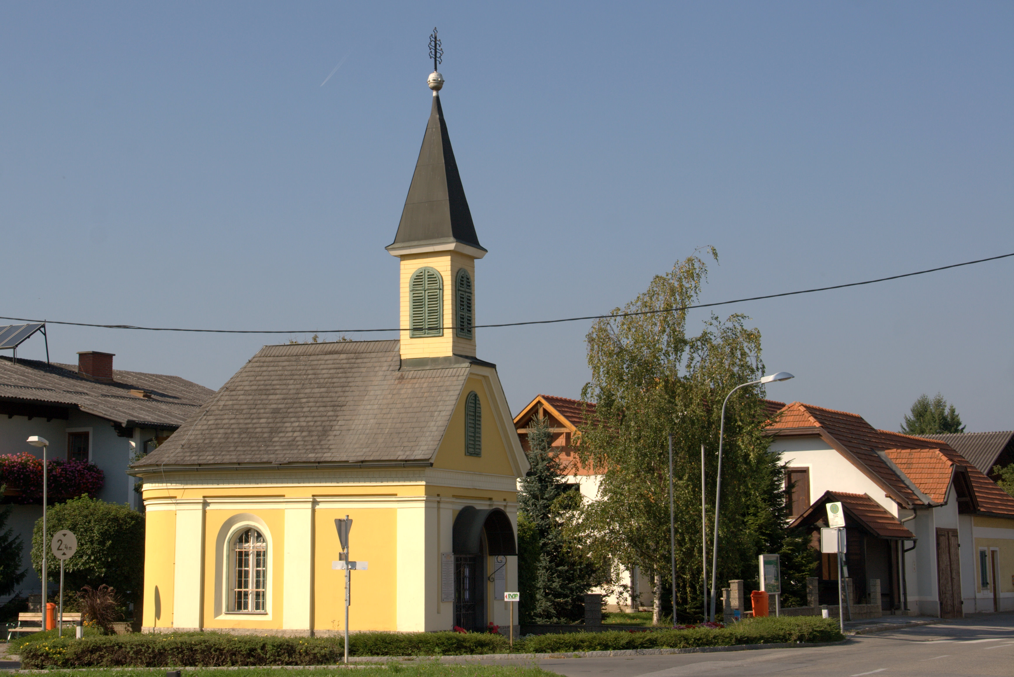 Ortskapelle (Meßkapelle) Schmerzhafte Mutter